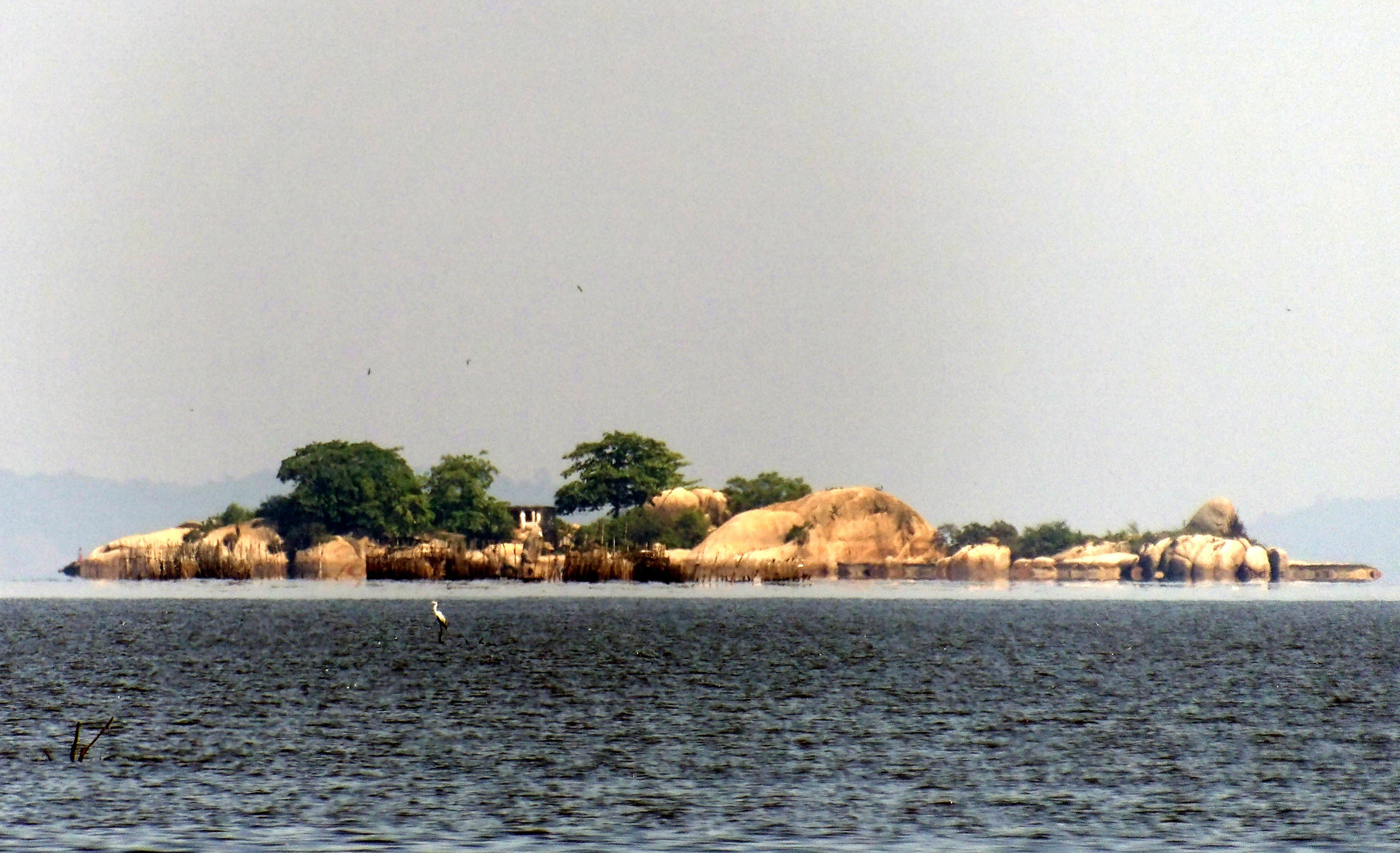 Fotografia da Ilha do Sol, na Baía de Guanabara, Rio de Janeiro, Brasil.